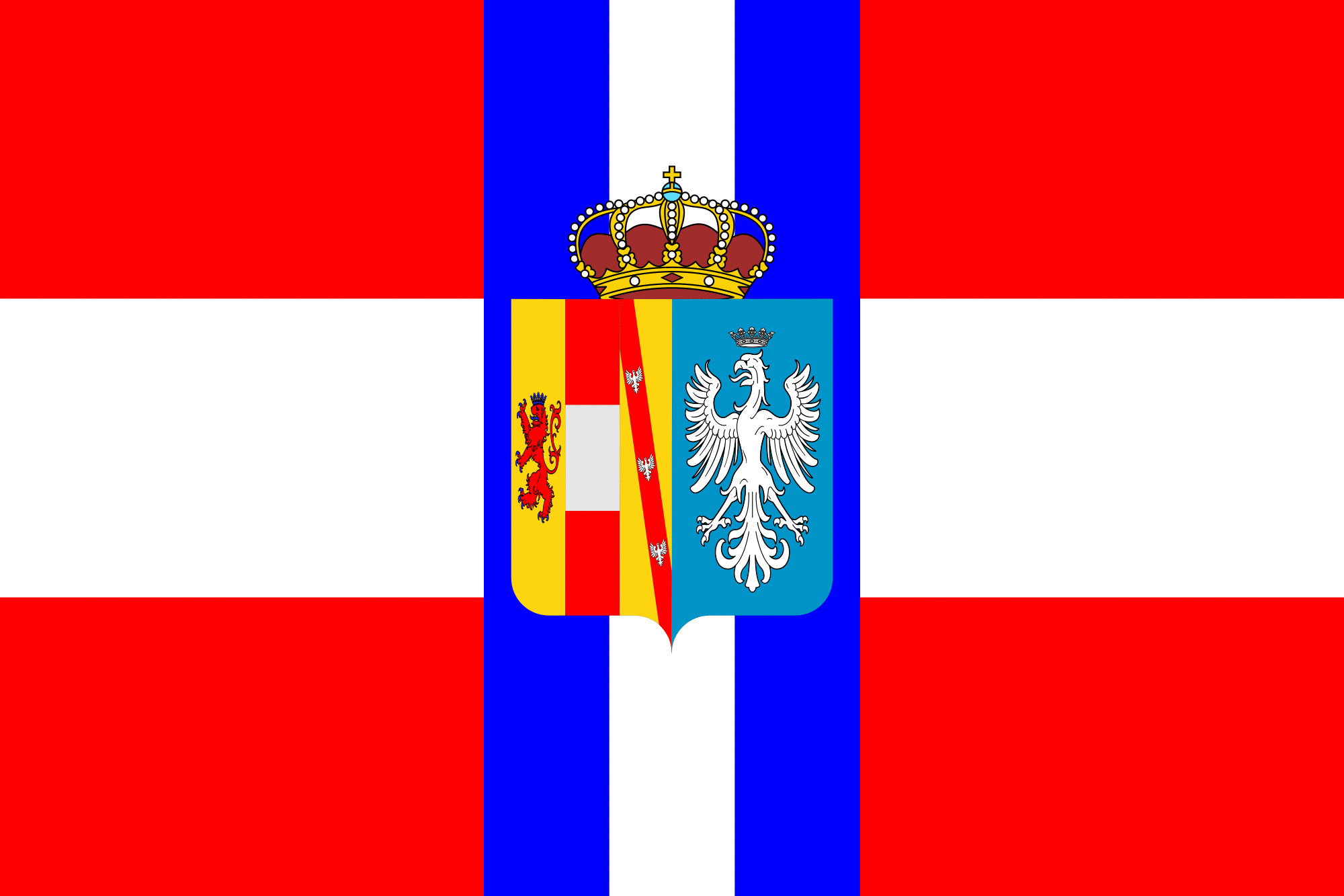 Bandiera del ducato di Modena e Reggio (1830-1859).